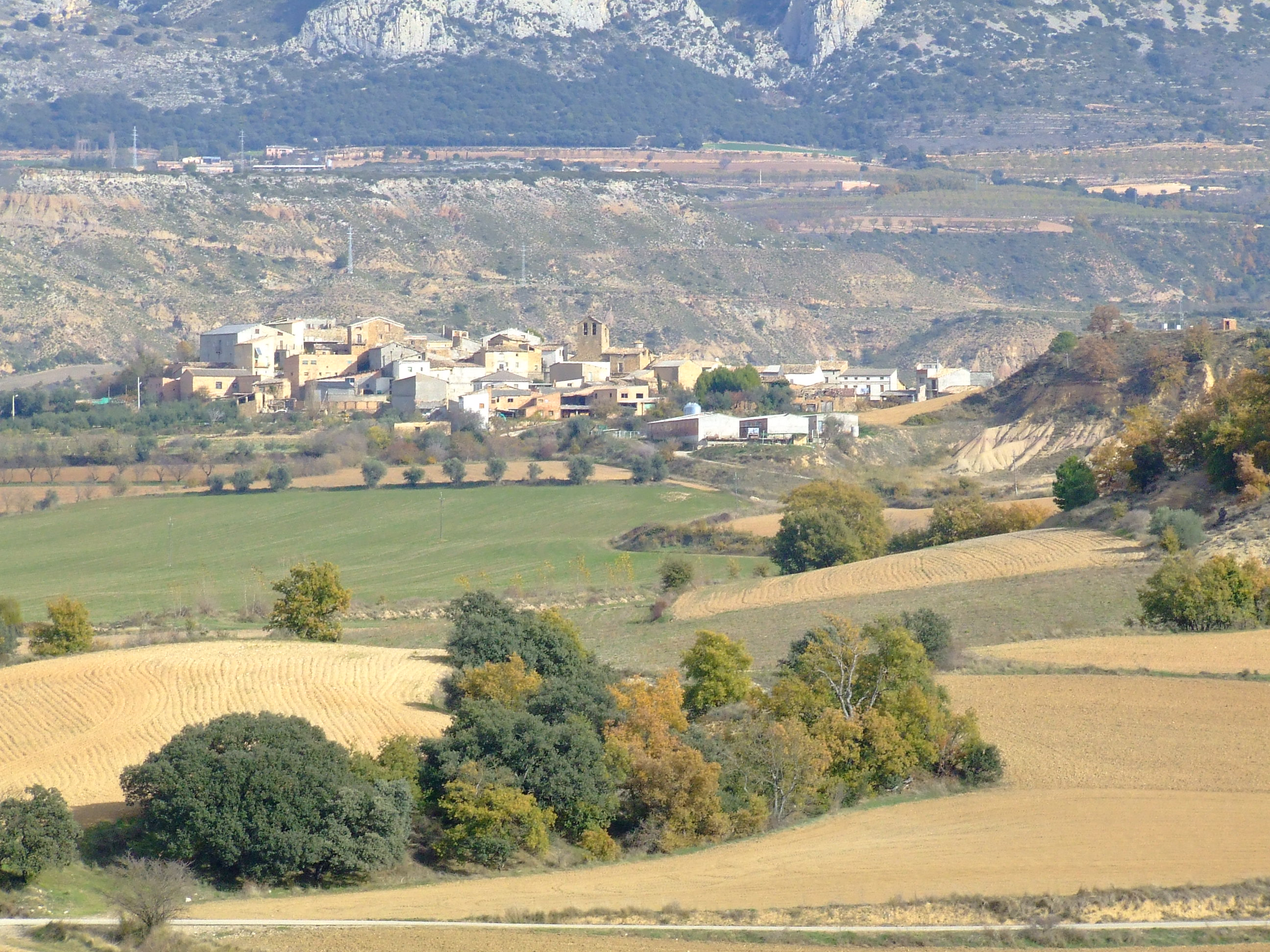 Sant Romà d'Abella des del Mont de Conques (Isona i Conca Dellà, Pallars Jussà)